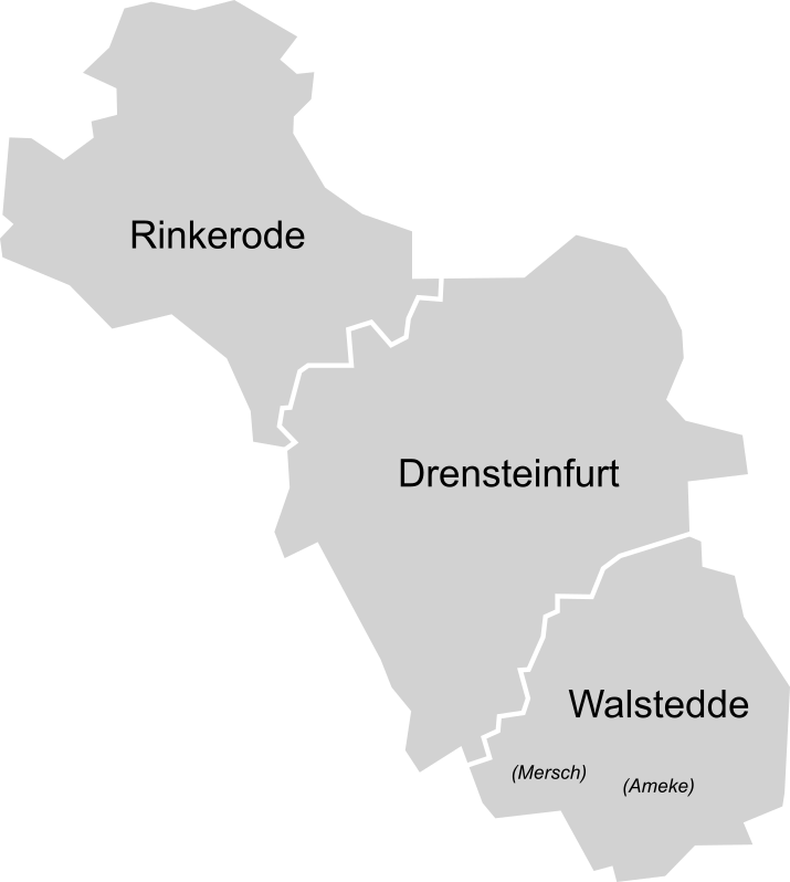 Ortsteilkarte Drensteinfurt